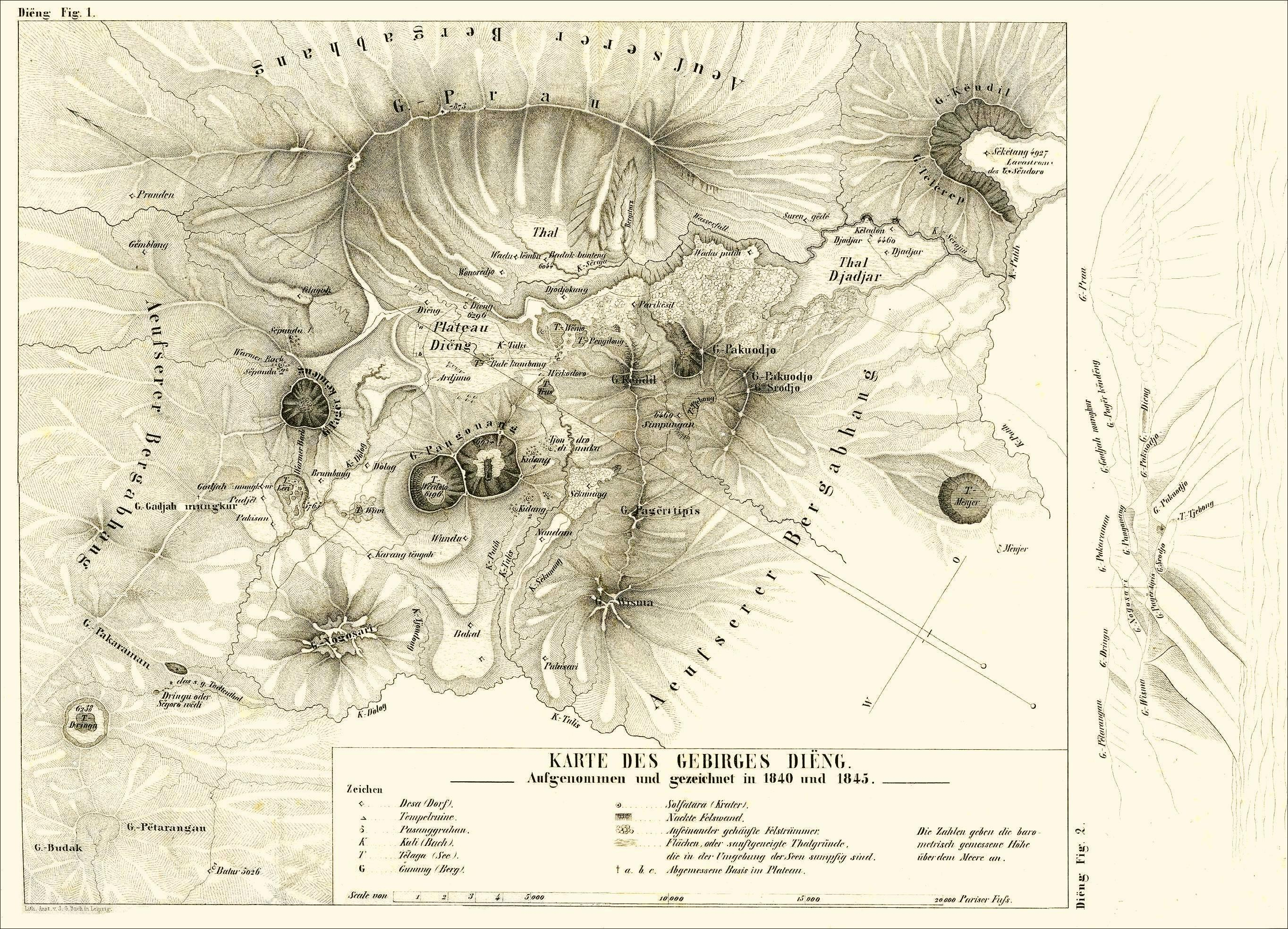 Junghuhns Karte des Dieng-Plateaus